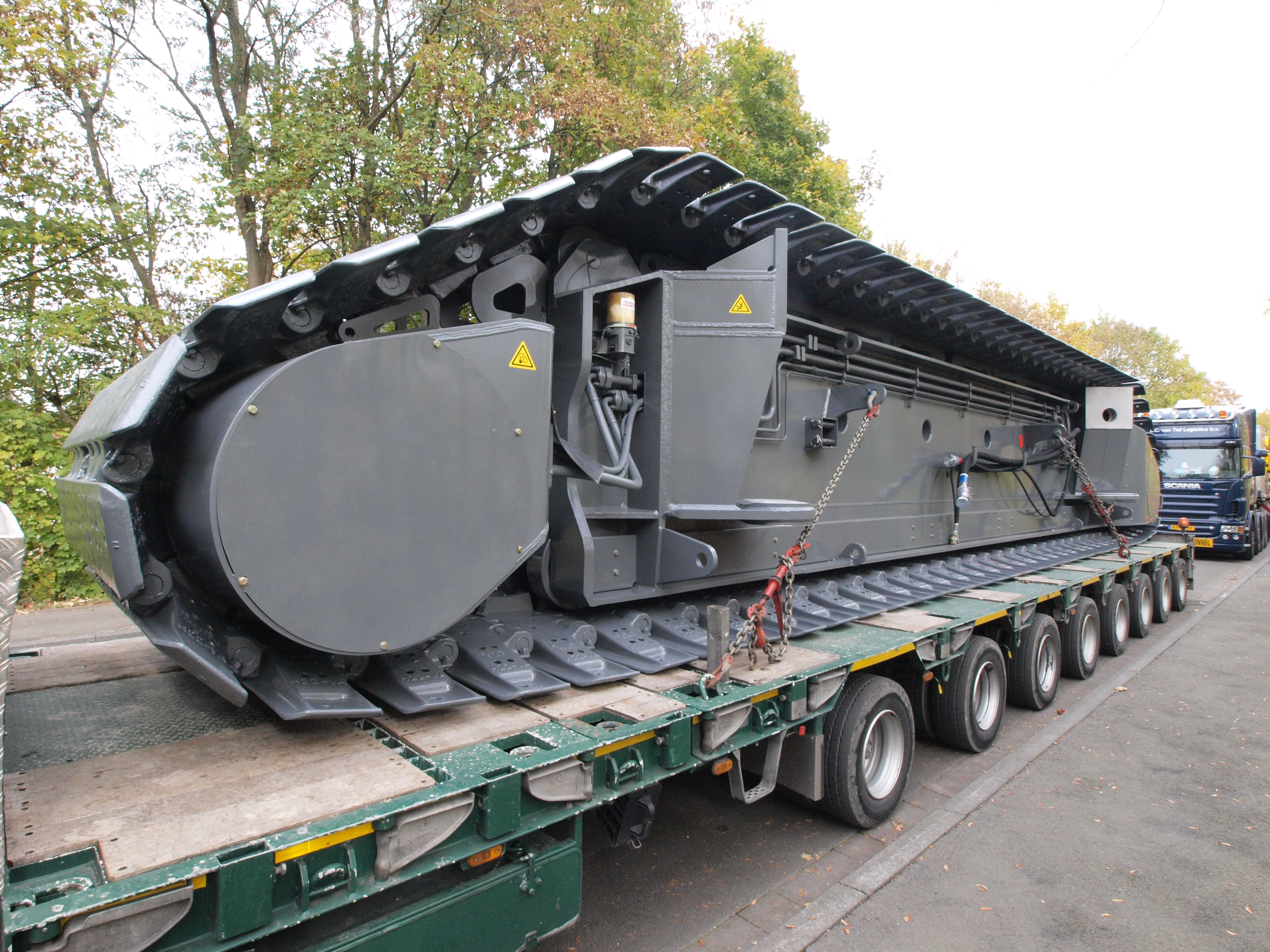 Terex Demag CC2200i part